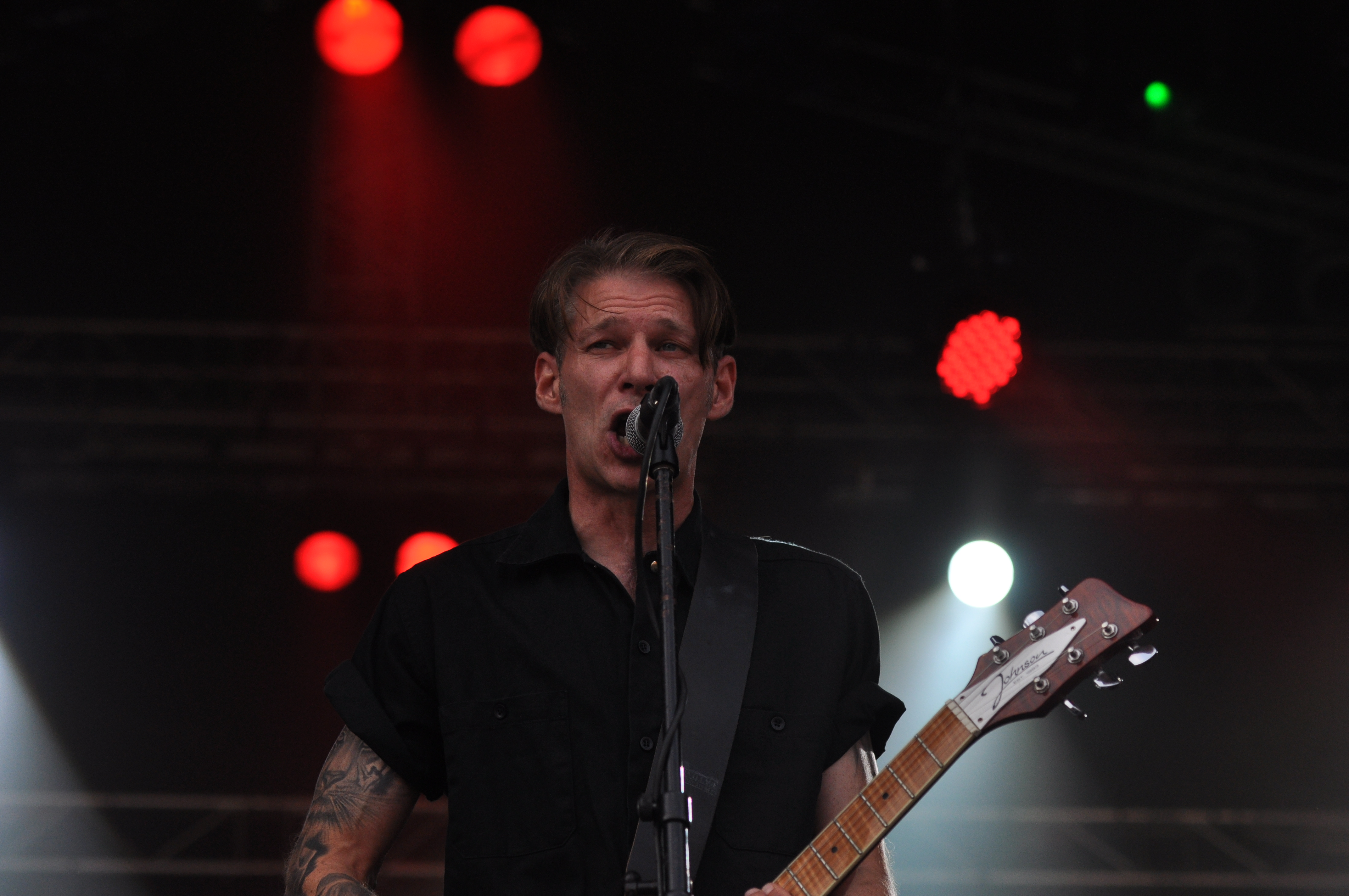 Rantanplan bei Rocken am Brocken 2014